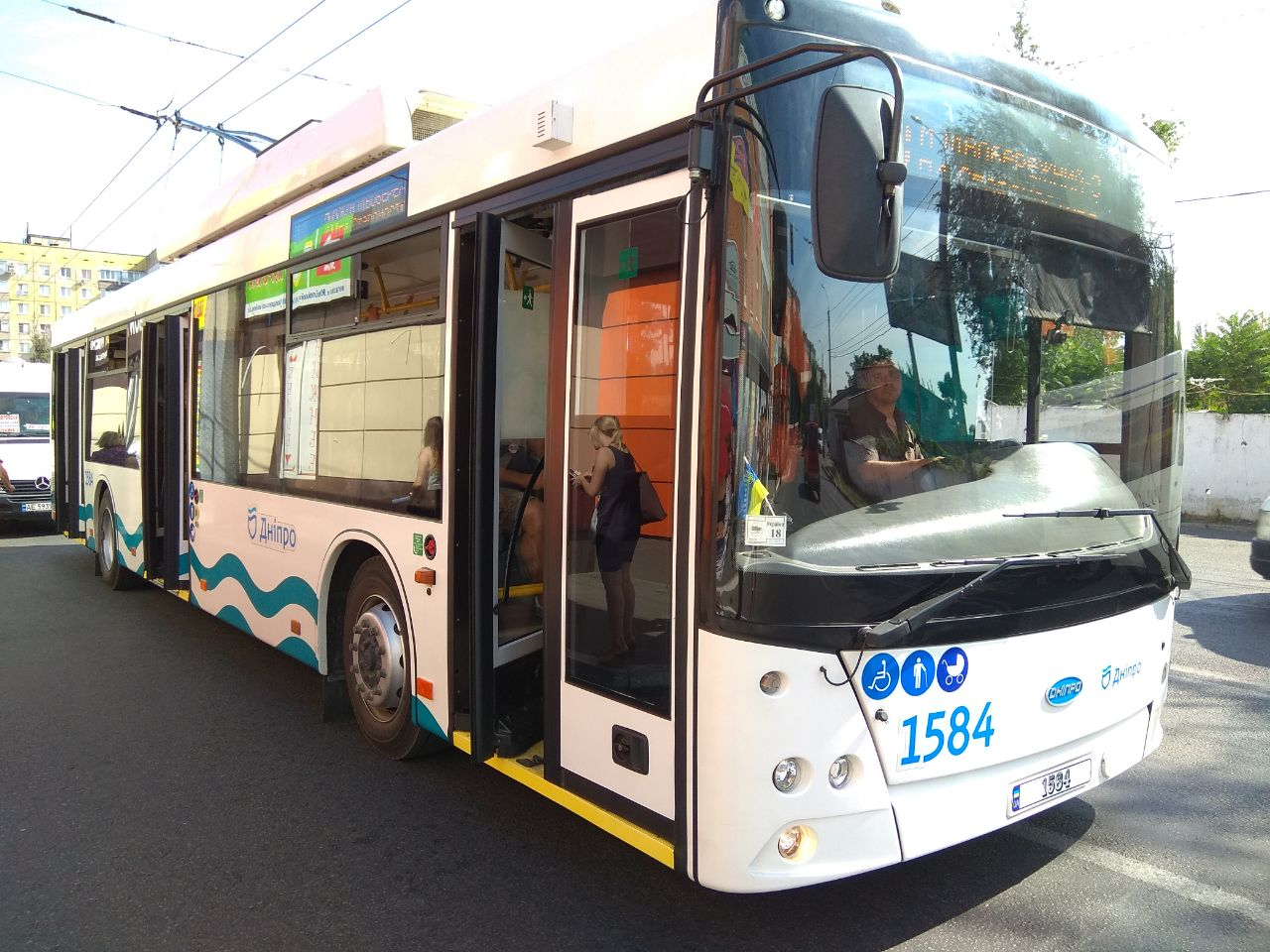 Троллейбус Дніпро Т203 №1584 на зупинці "Вулиця Березинська" у Дніпрі